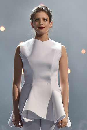 Премия Золотая маска - 2017 года